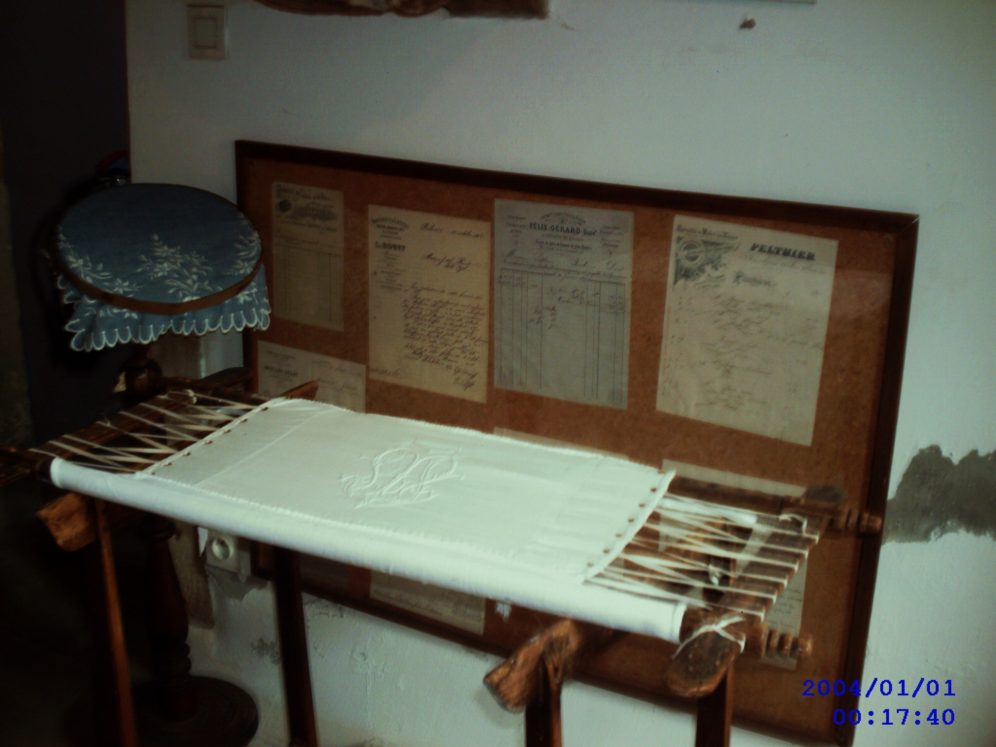 métier à broder plat et métier à tambour